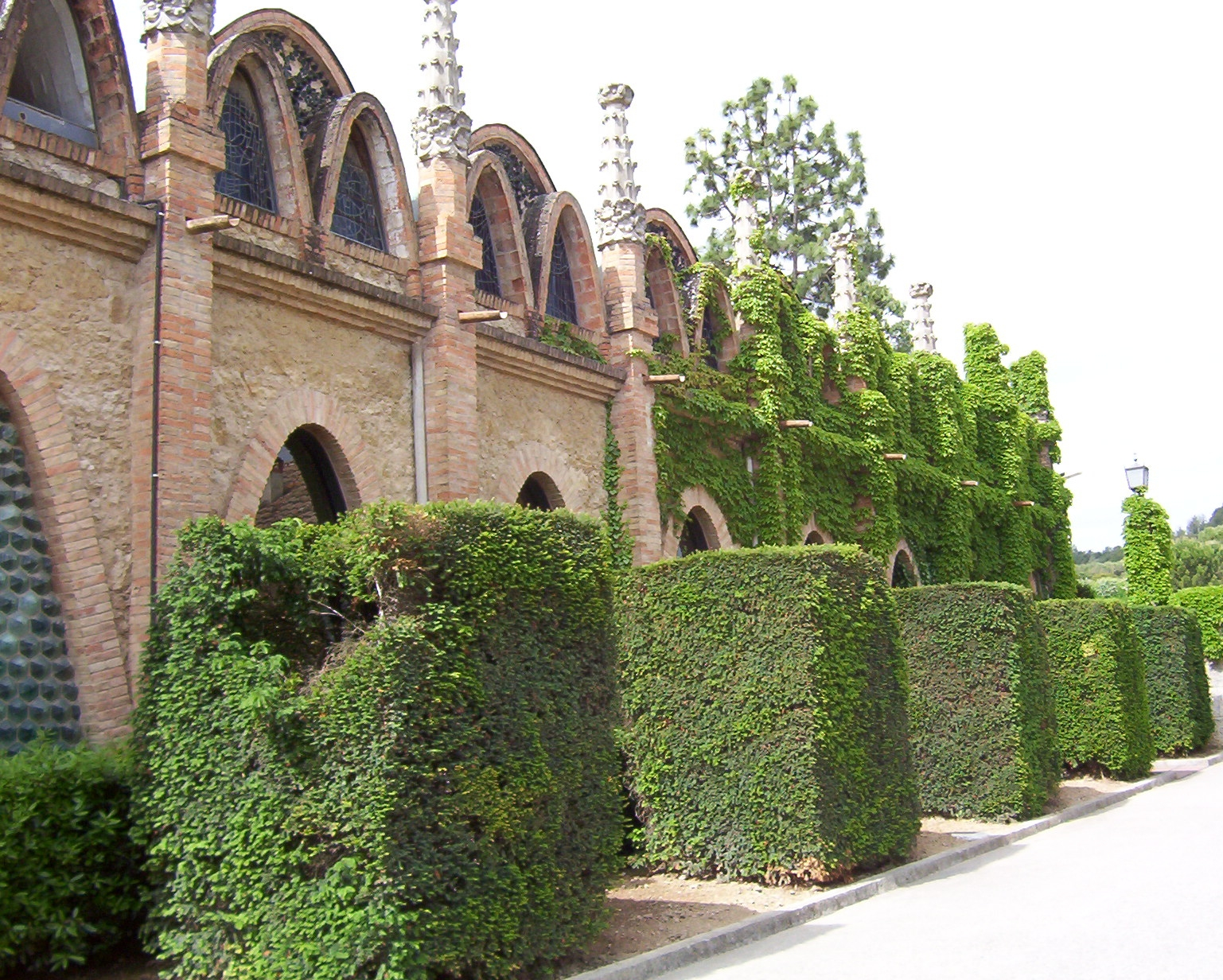 Parabelbögen am Stammhaus von Codorniu